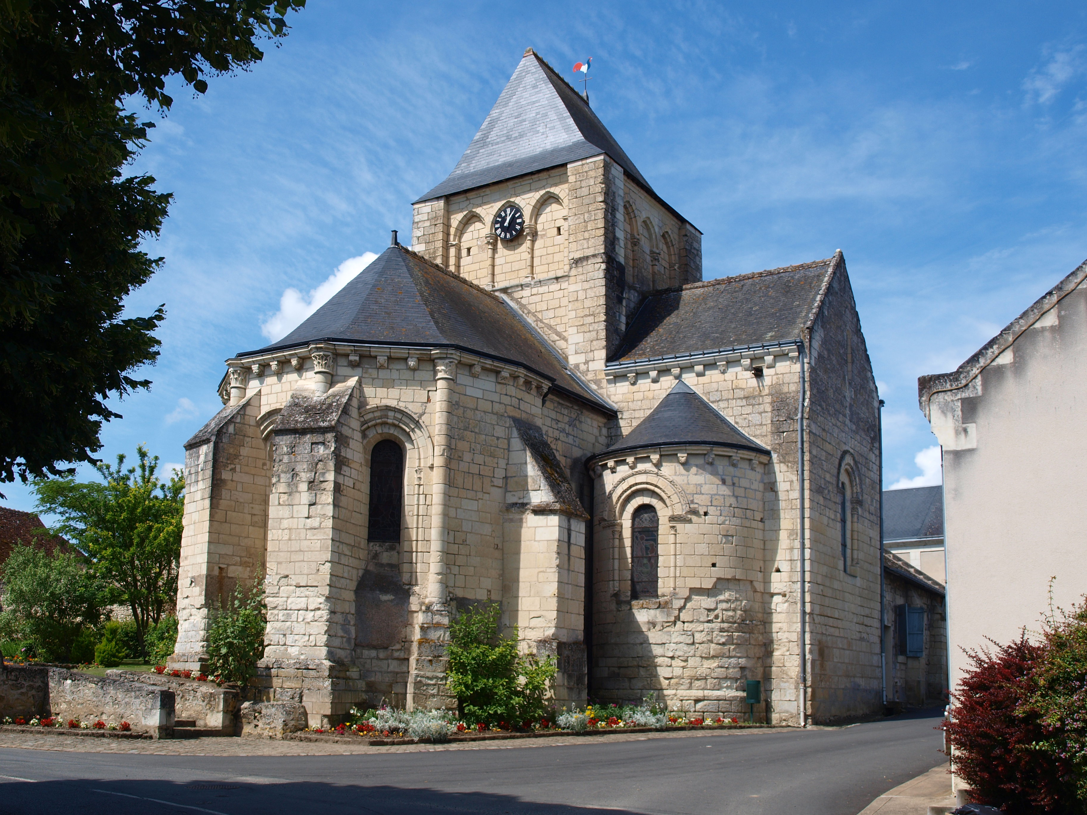 Crouzilles (Indre-et-Loire, France) ; l'église communale.